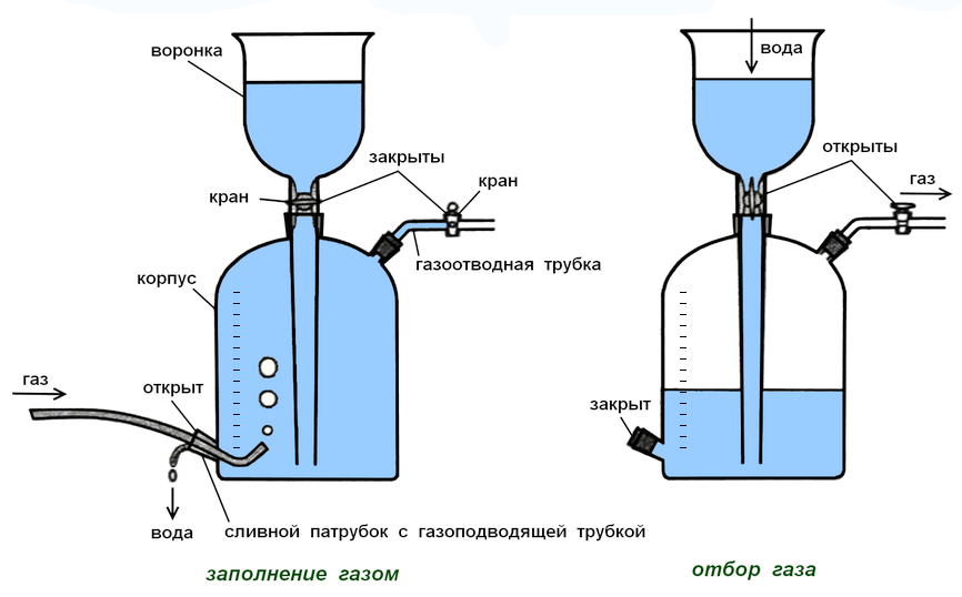 Лабораторный газометр Берцелиуса